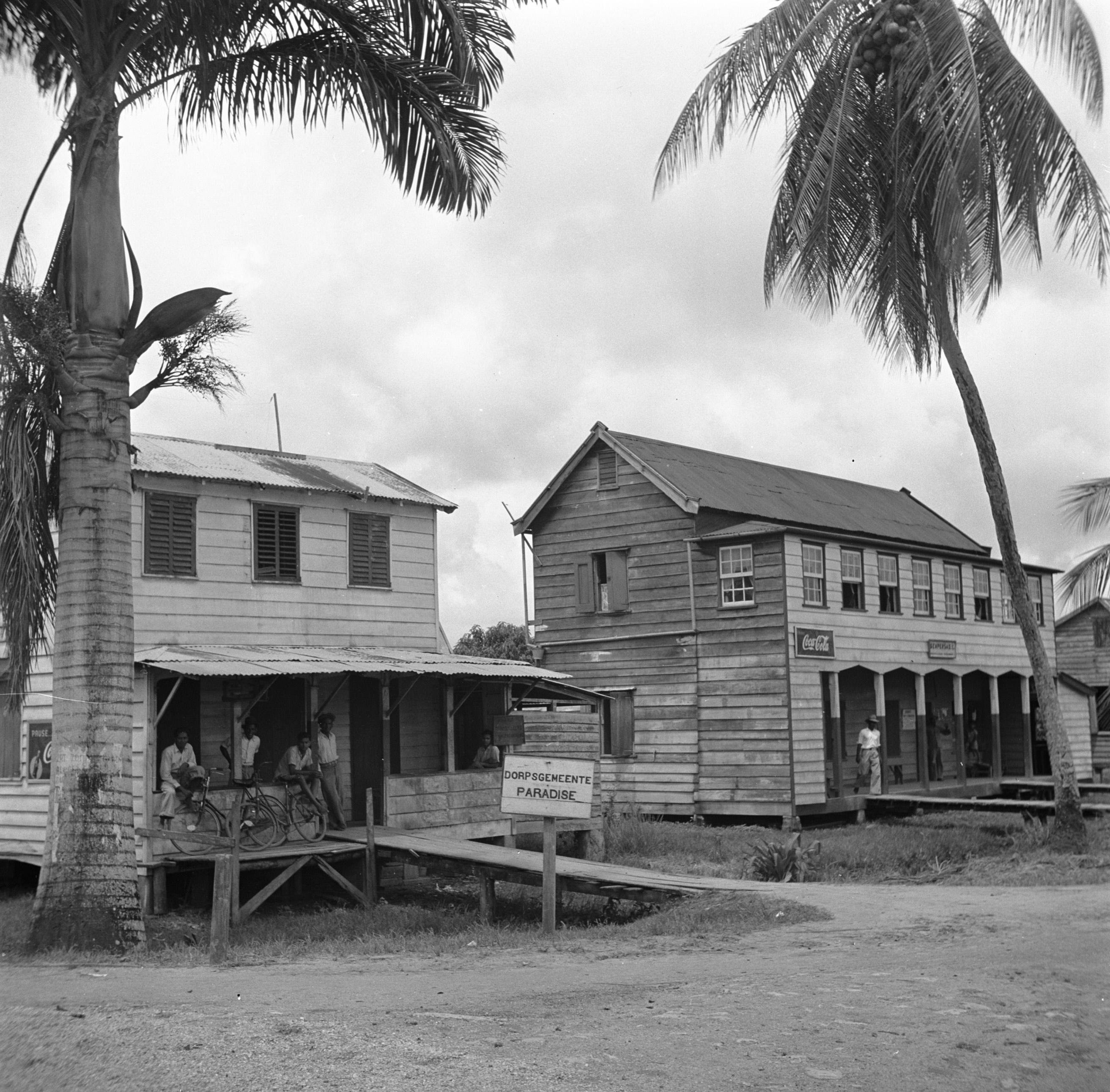 Collectie / Archief : Fotocollectie Van de Poll Reportage / Serie : Reis naar Suriname en de Nederlandse Antillen Beschrijving : De dorpsgemeenschap Paradise Annotatie : Paradise ligt ten zuidoosten van Nieuw-Nickerie Datum : 1947 Locatie : Nickerie, Paradise, Suriname Trefwoorden : straatbeelden, woningen Fotograaf : Poll, Willem van de Auteursrechthebbende : Nationaal Archief Materiaalsoort : Negatief (zwart/wit) Nummer archiefinventaris : bekijk toegang 2.24.14.02 Bestanddeelnummer : 252-5607